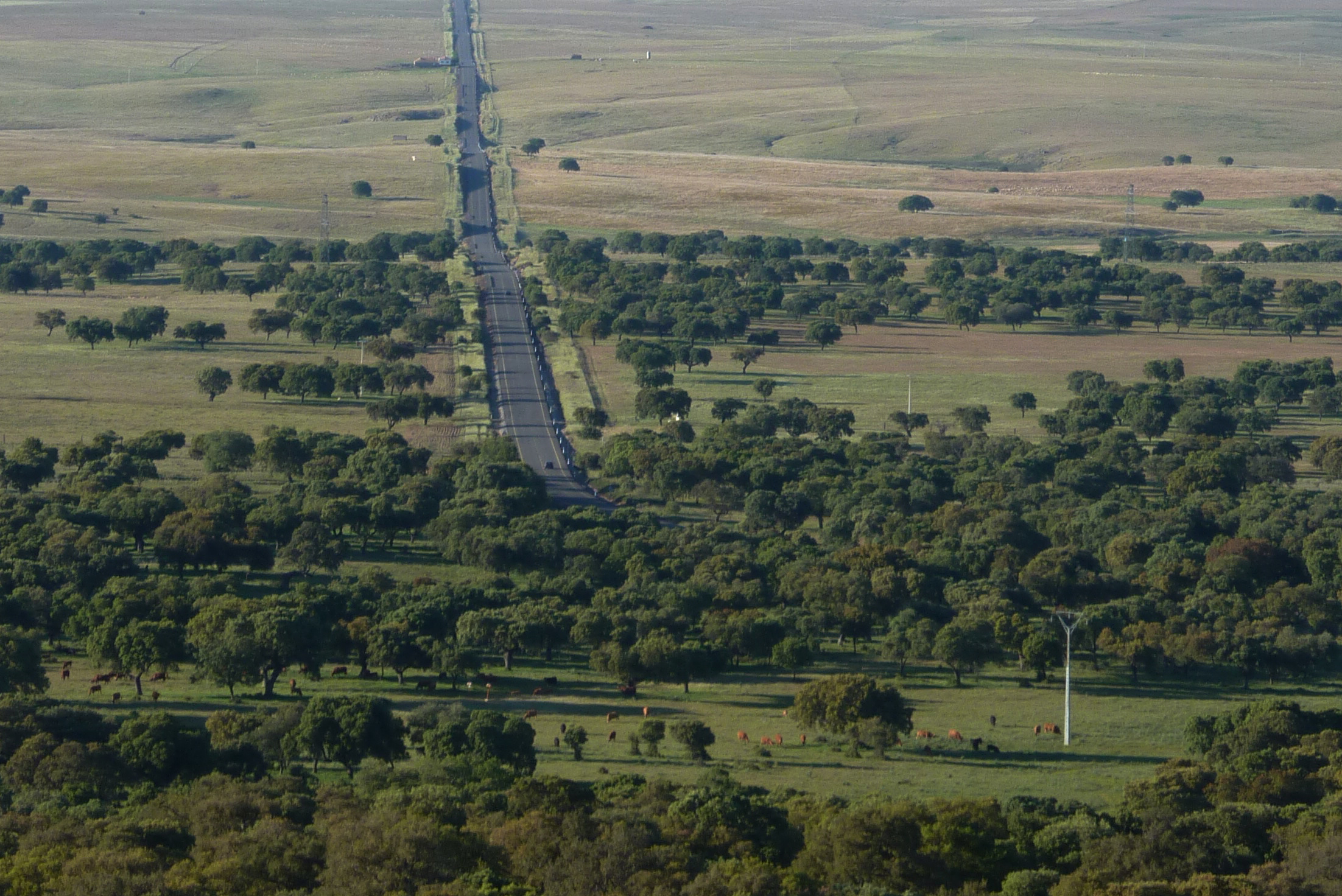 Savannah! - Valle de Alcudia